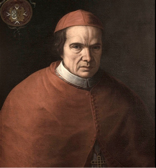 Retrato del cardenal Manuel Arias y Porres (1638-1717), que fue arzobispo de Sevilla.